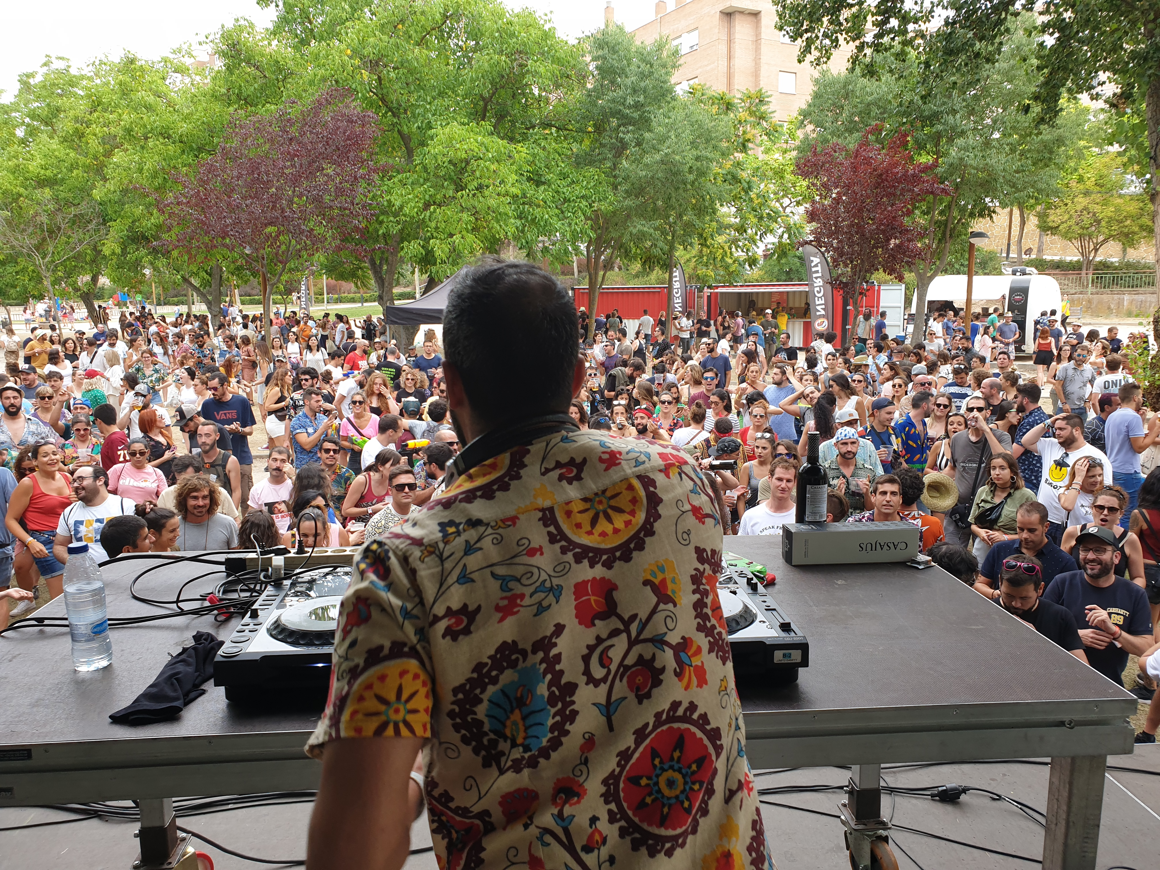 El disc-jockey guatemalteco Meneo durante su actuación en el Escenario Charco del festival Sonorama Ribera 2019, en Aranda de Duero, Burgos, España.